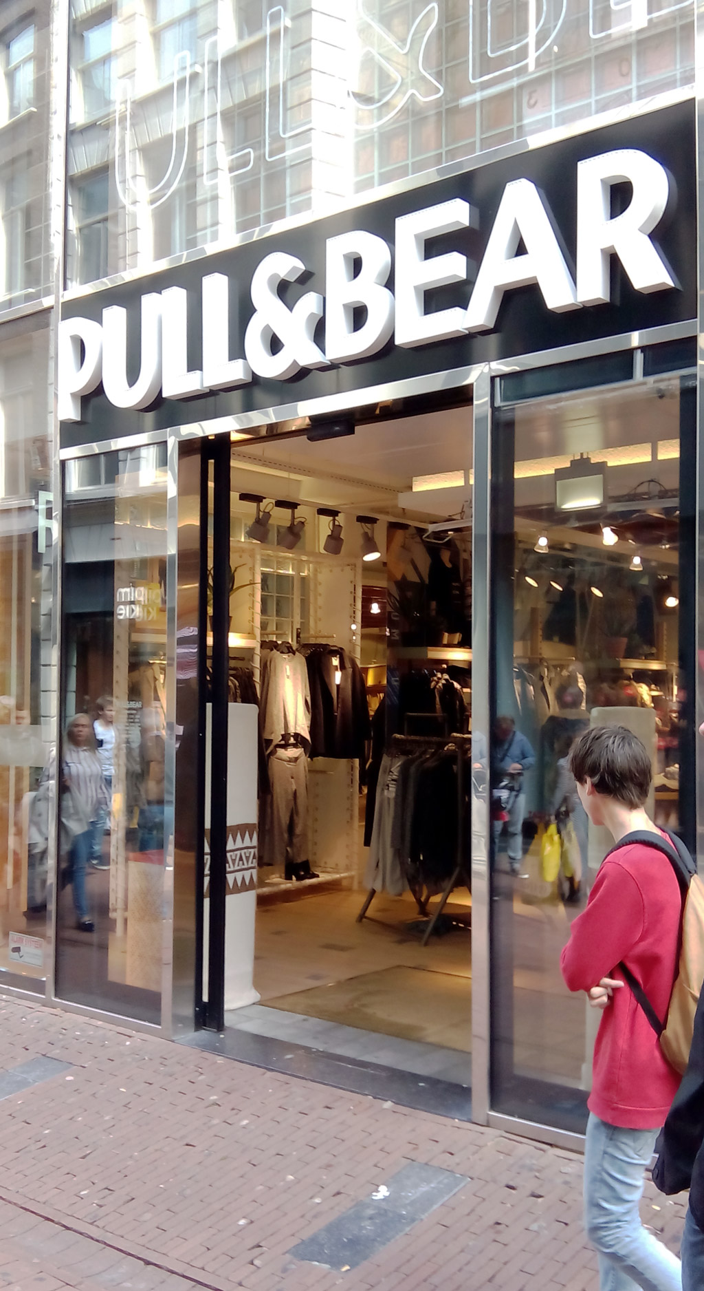 Tenda de P&B en Amsterdam.